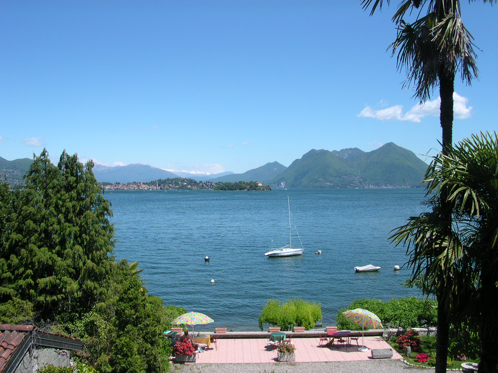 Baveno, vista del Lago Maggiore.